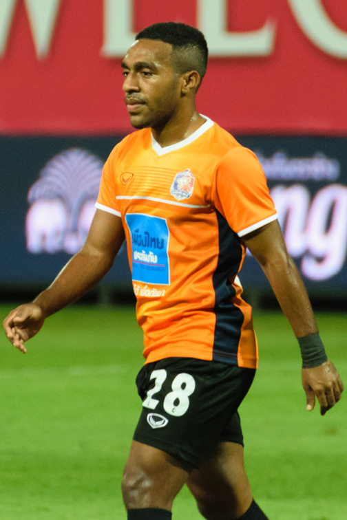 Terens Puhiri